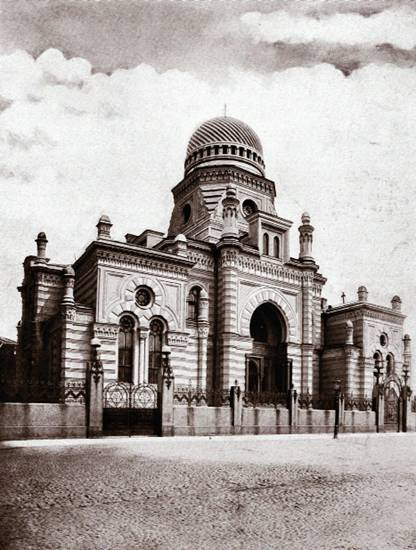 Открытка с изображением Большой хоральной синагоги в Санкт-Петербурге